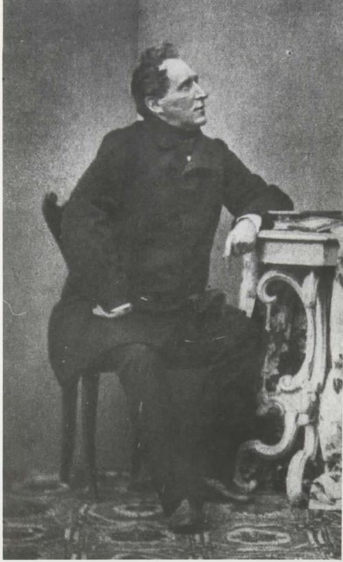 Janez Bleiweis Trsteniški (1808-1881)